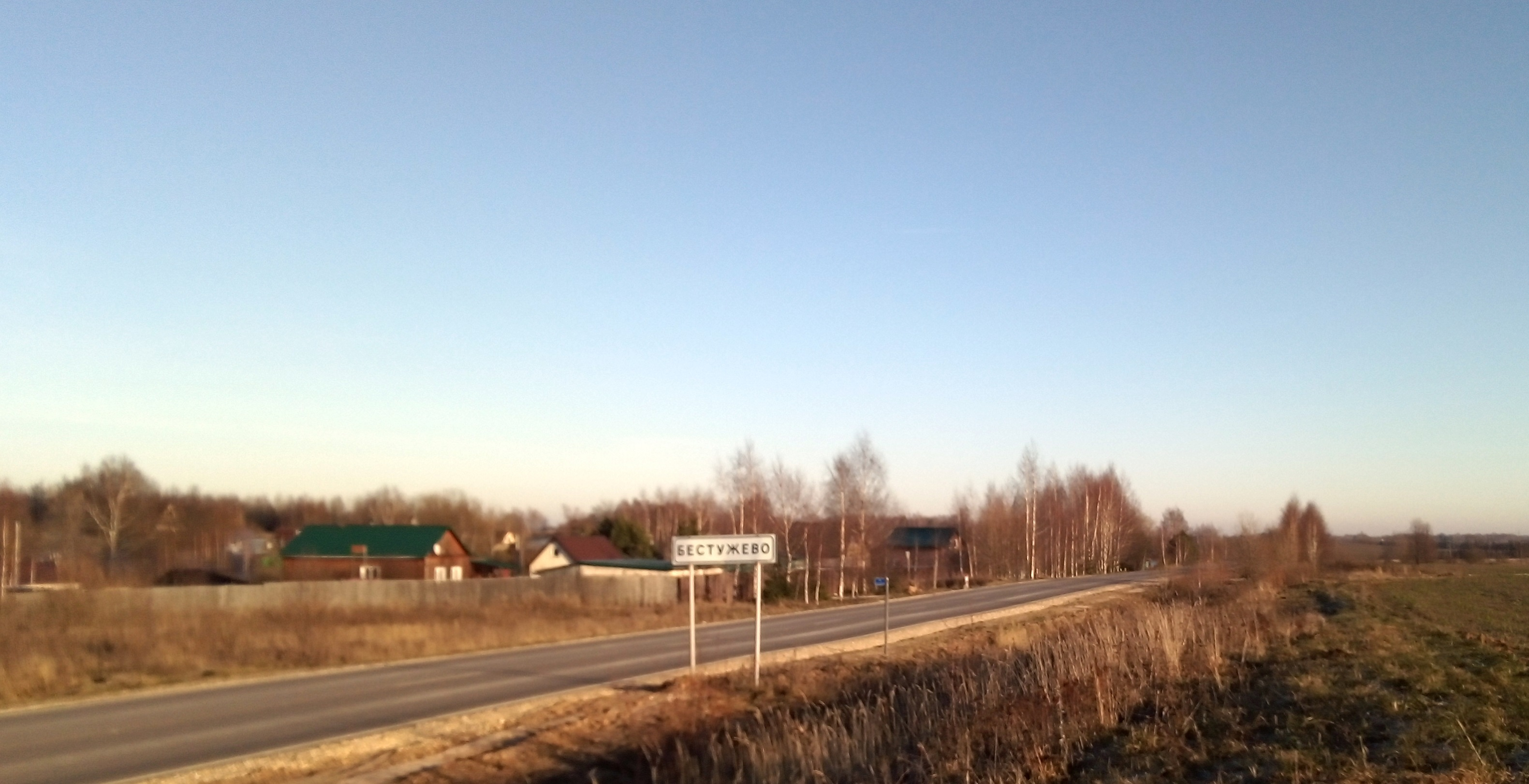 Бестужево.